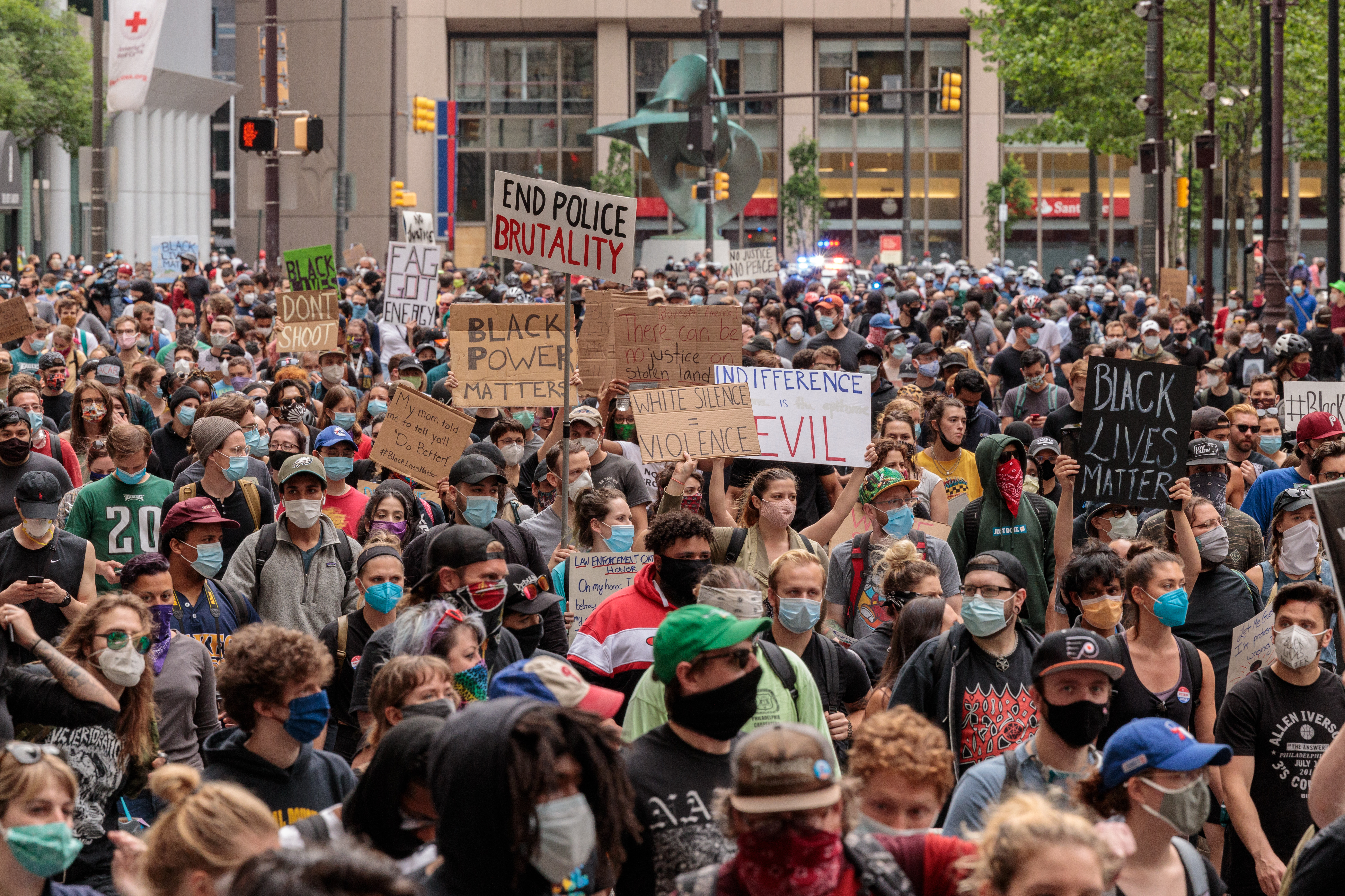 Civil Unrest 2020